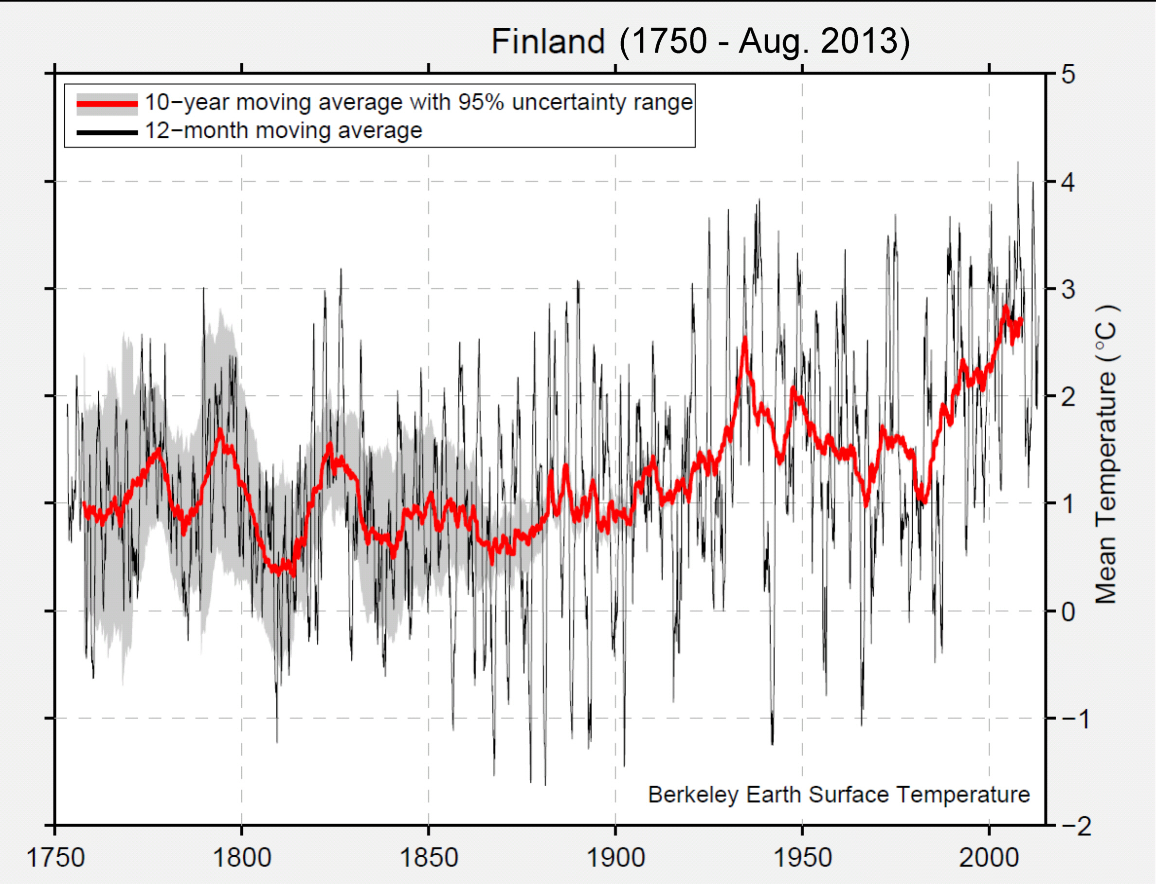 Mittlere Jahrestemperaturen in Finnland 1750 bis August 2013 als gleitende 12 Monatsmittel. 10-Jahresmittelwerte. - Originaldaten aller Wetterstationen, durch Berkeley Earth (USA) validiert und harmonisert